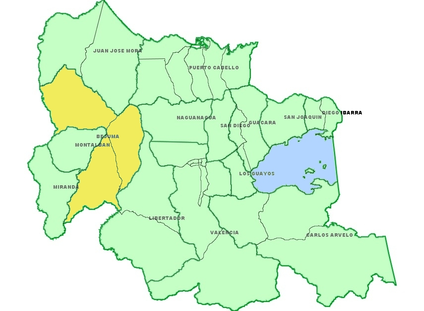 Bejuma in Carabobo, Venezuela